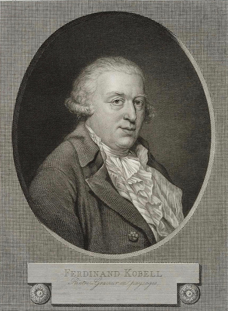 Wilhelm Friedrich Schlotterbeck (1777–1819) nach Joseph Hauber (1766–1834): Der Landschaftsmaler und Radierer Ferdinand Kobell (1740–1799), 1806.